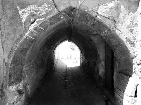 قنطرة في مدينة الموصل القديمة